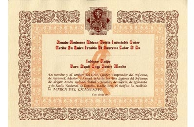 Diploma de los cursos de Licantropía aplicada, del programa Sólo sé que noche nada.